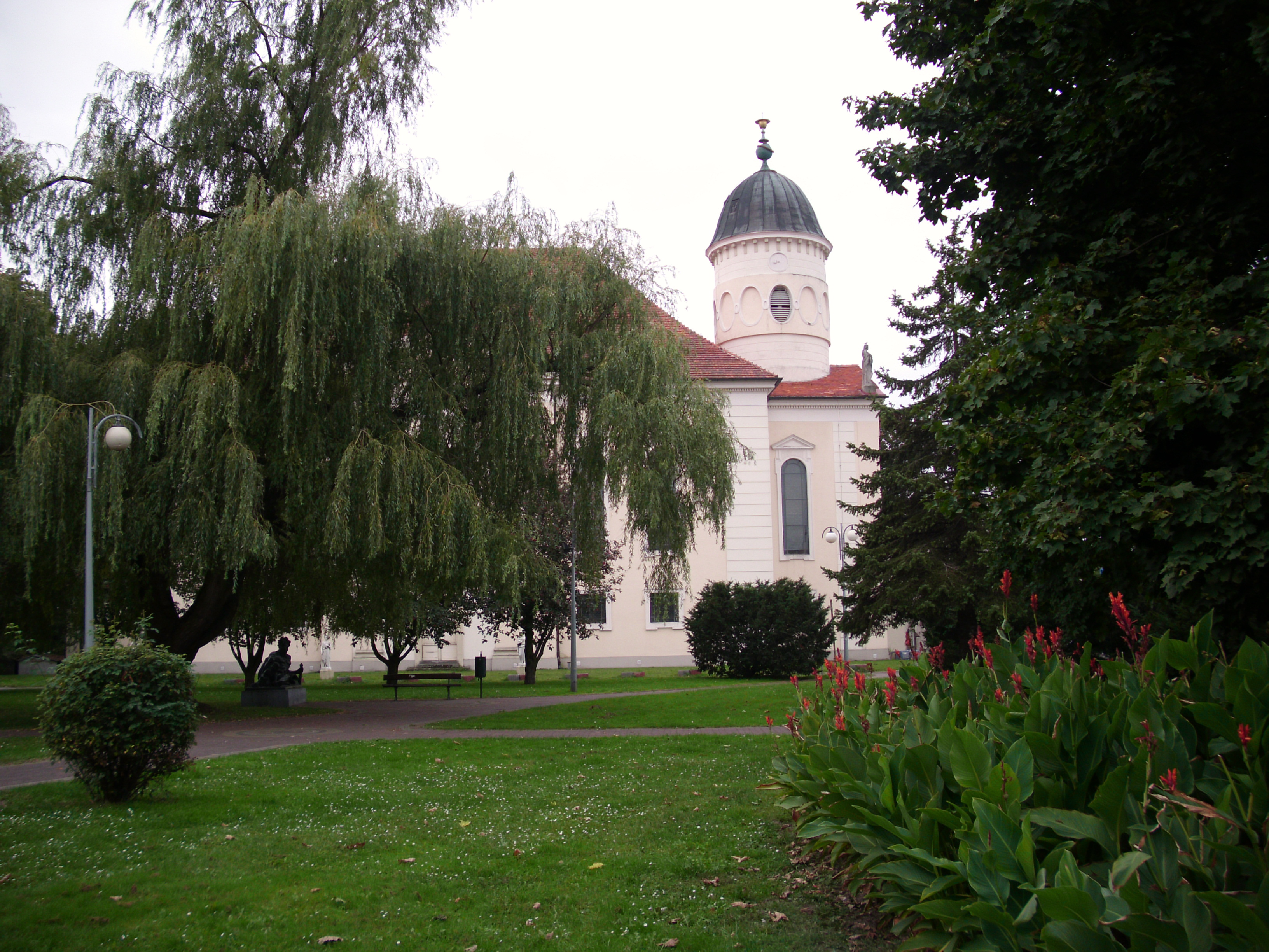 Kościół ewangelicki w Sycowie